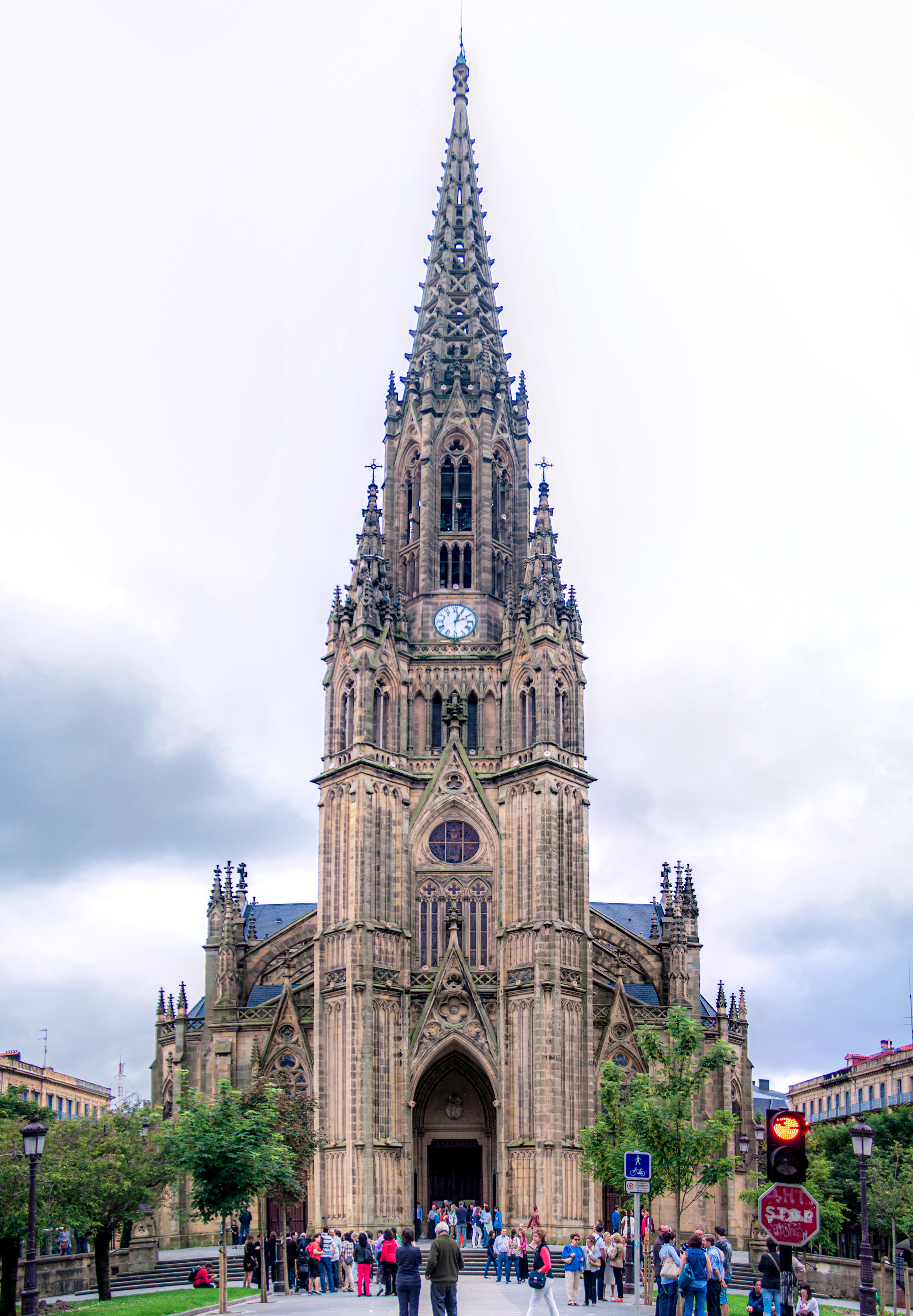 San Sebastián, España